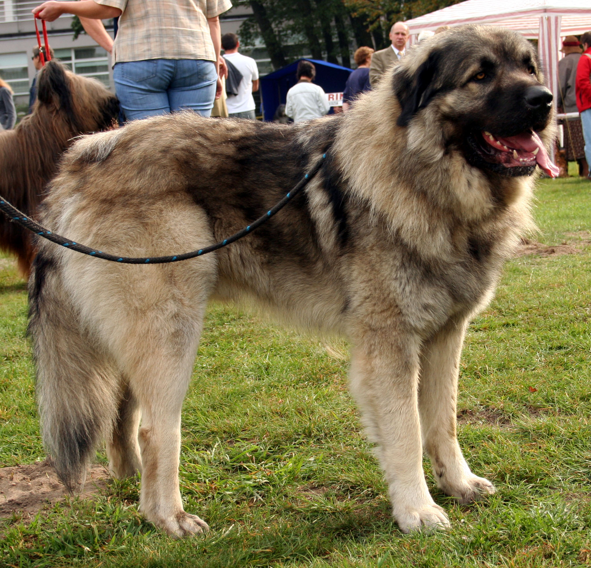 Szarplaninac na krajowej wystawie w Rybniku - Kamieniu